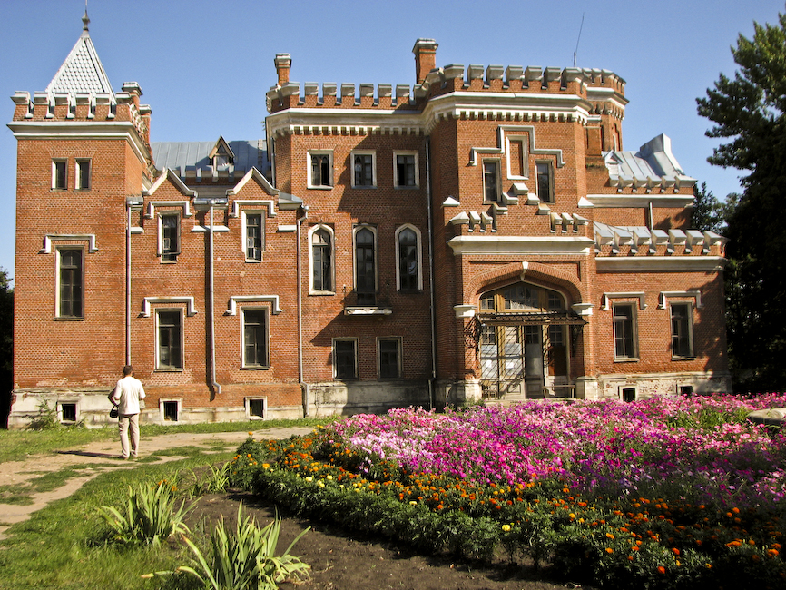 Рамонь,Дворец принцессы Е. М. Ольденбургской